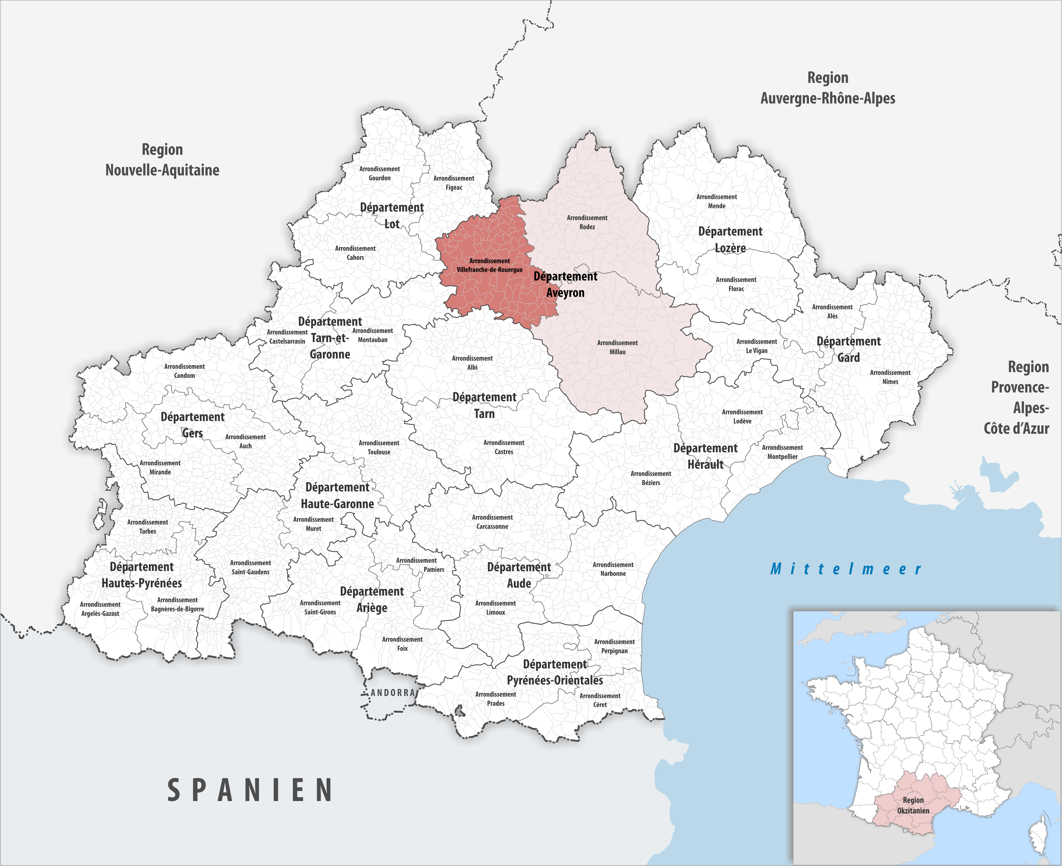 Lage des Arrondissements Villefranche-de-Rouergue